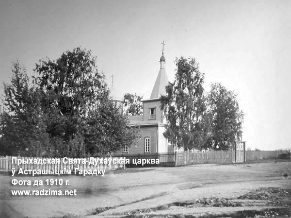 Беларуская (тарашкевіца): Астрашыцкі Гарадок (Astrašycki Haradok). Царква